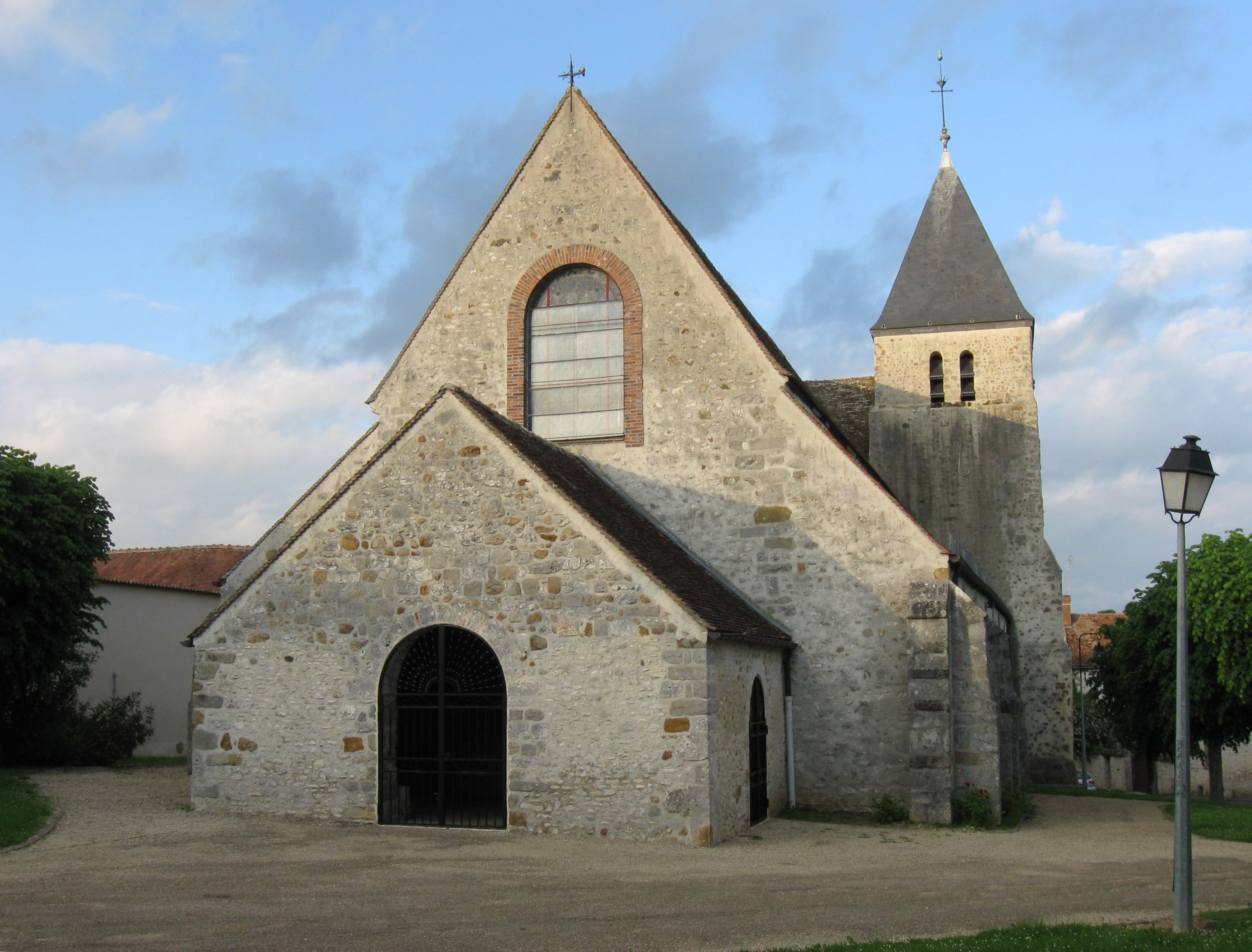 Église Saint-Savinien-et-Saint-Potencien de Gouaix. (Seine-et-Marne, région Île-de-France).